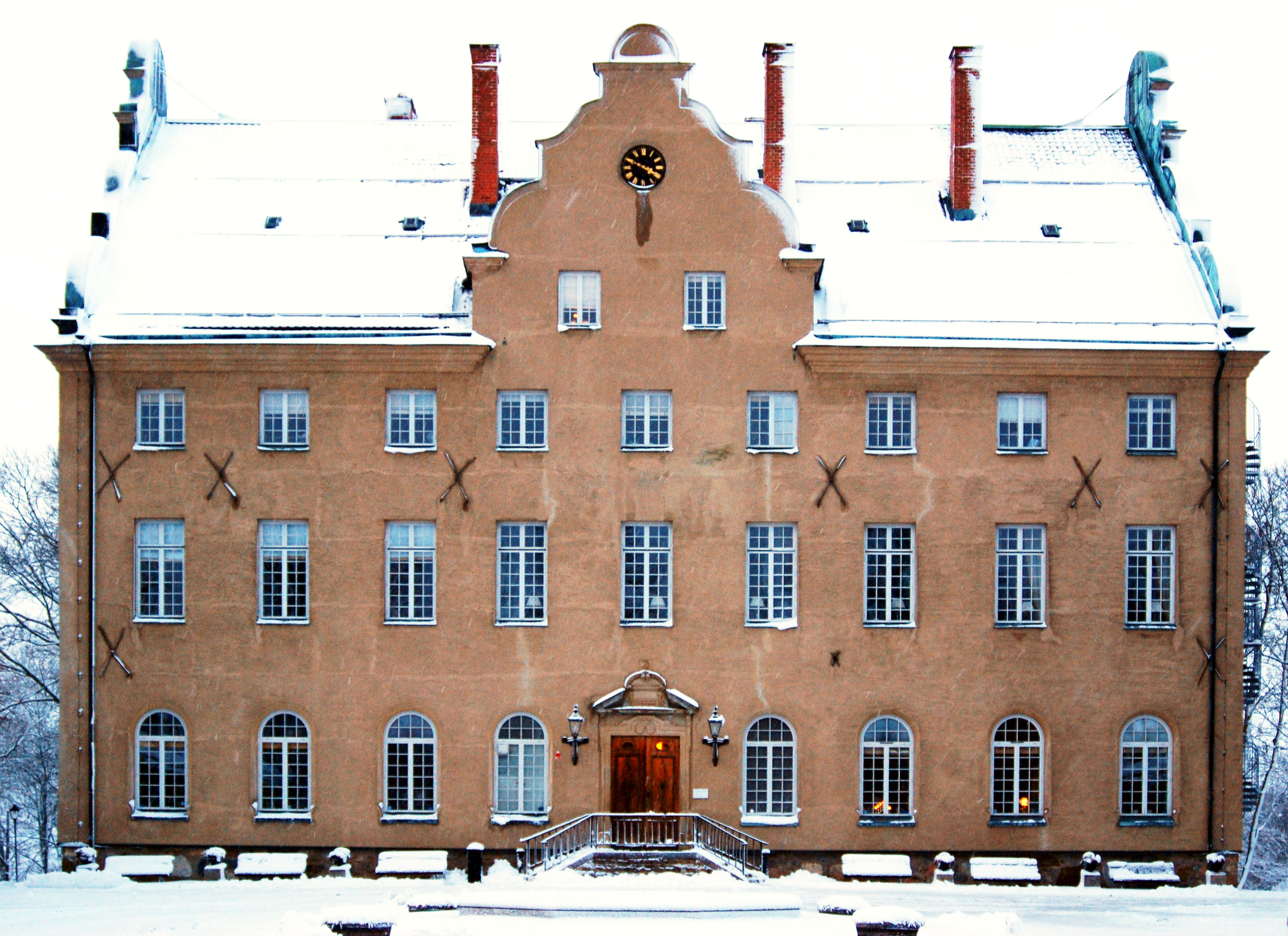 Djursholms Slott